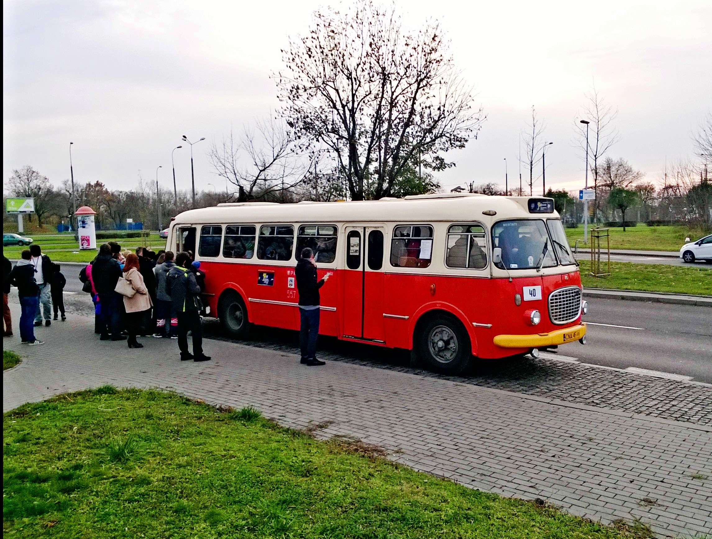 Autobus marki Jelcz w Toruniu1, 2019